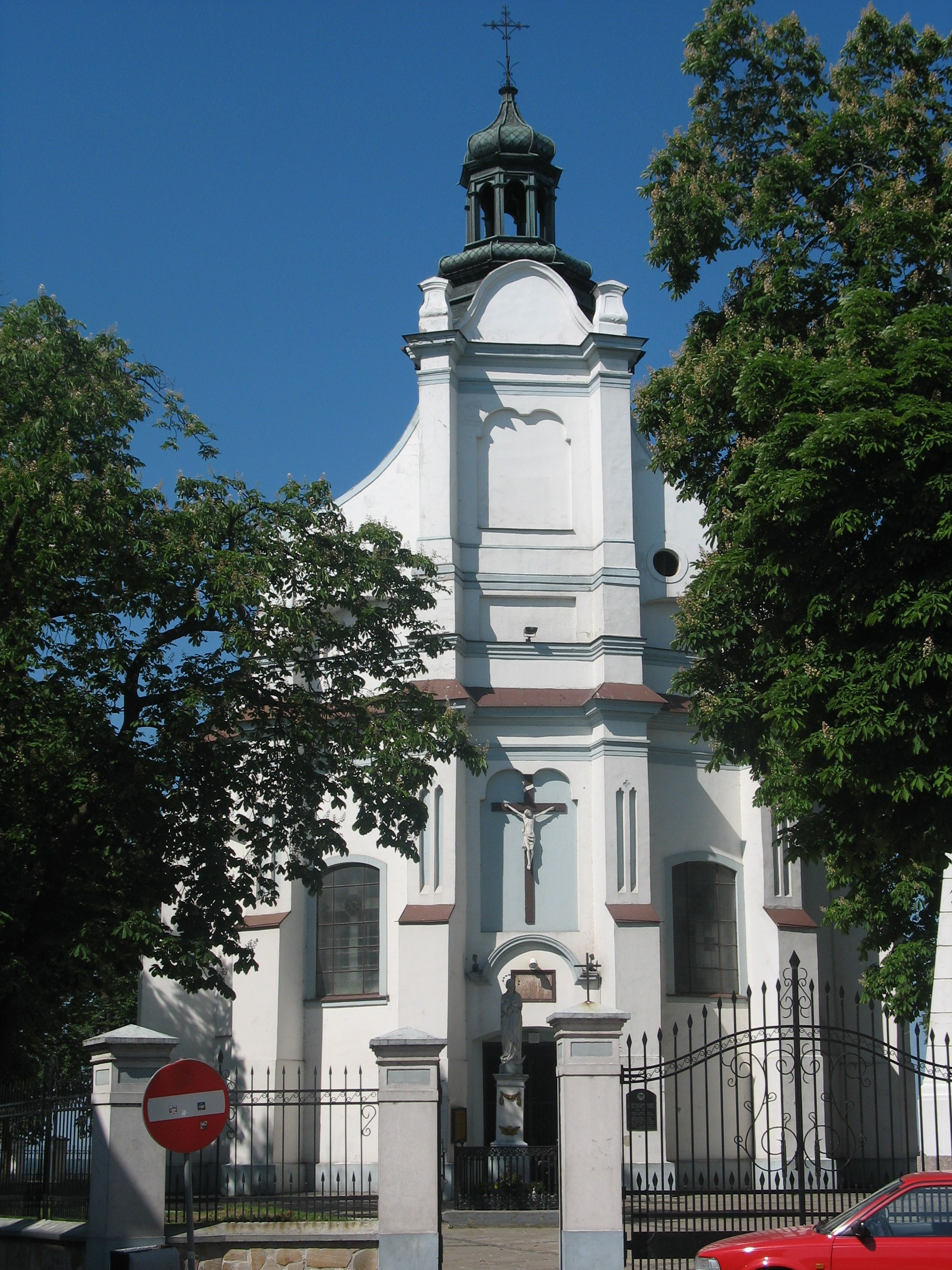 Kościół św. Bartłomieja w Płocku